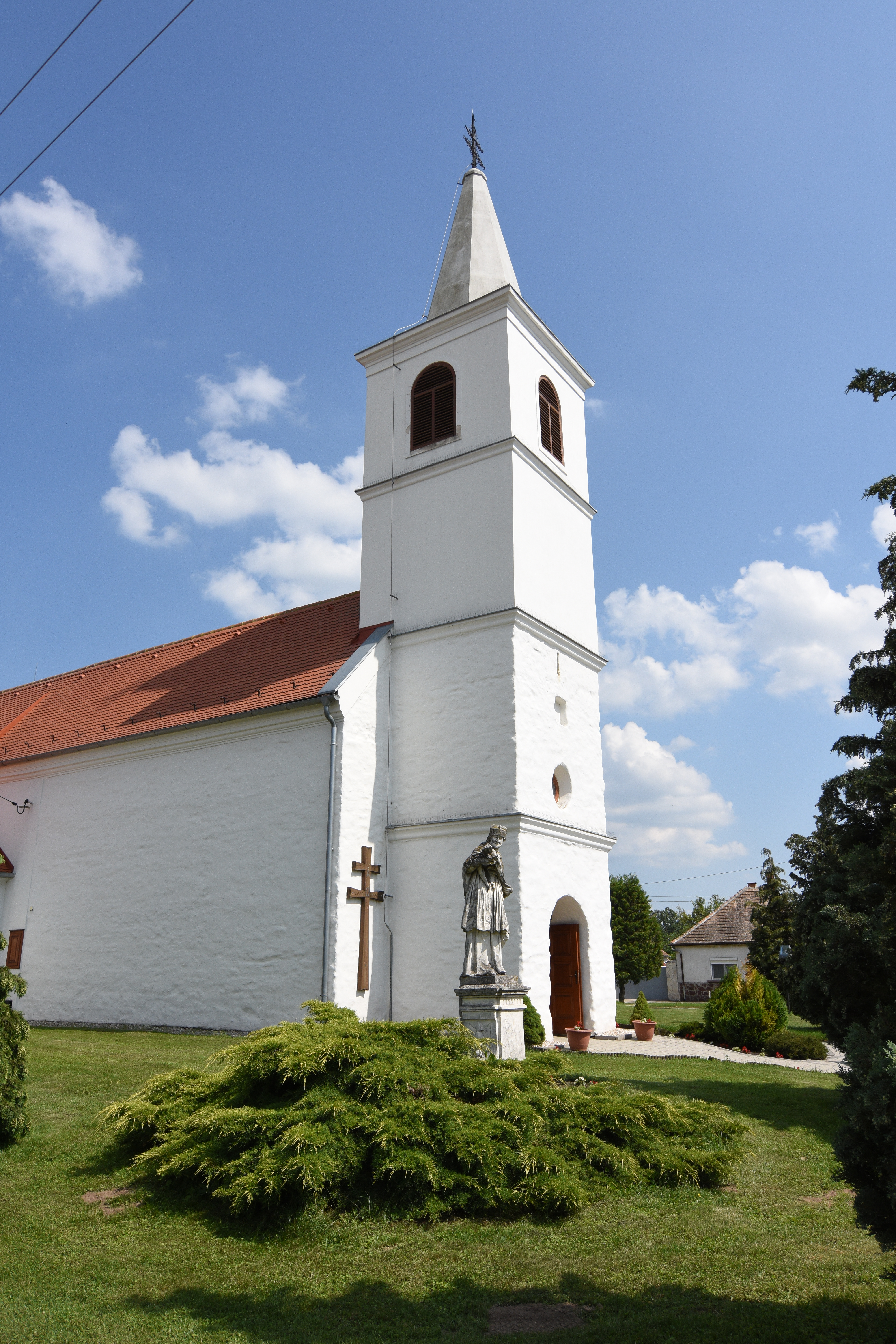 Szent László király templom Nemeskér